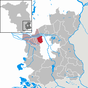 Dissen-Striesow in Brandenburg (Country) - District Spree-Neiße